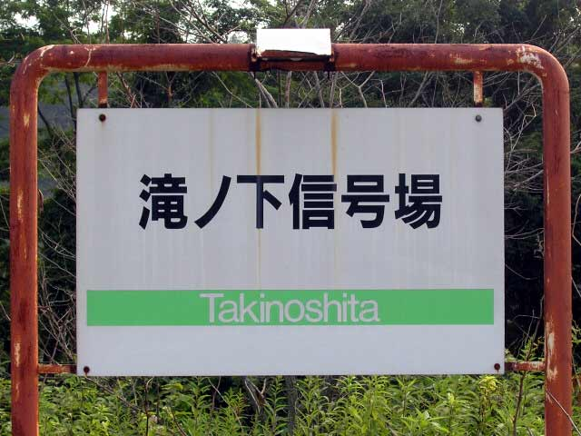 珍しい信号場看板 撮影場所 滝ノ下信号場 撮影者によるGFDLリリース